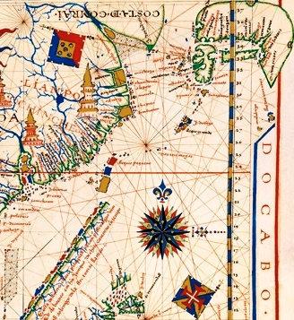 北回歸線上有三個島，即指台灣(與1568年版本相同)。北島右側標註島名為llequio peqeno（小琉球），東北方仍為Reis magos（古宮島）、llequio grande（大琉球）。福爾摩莎海域三島以南島最大。